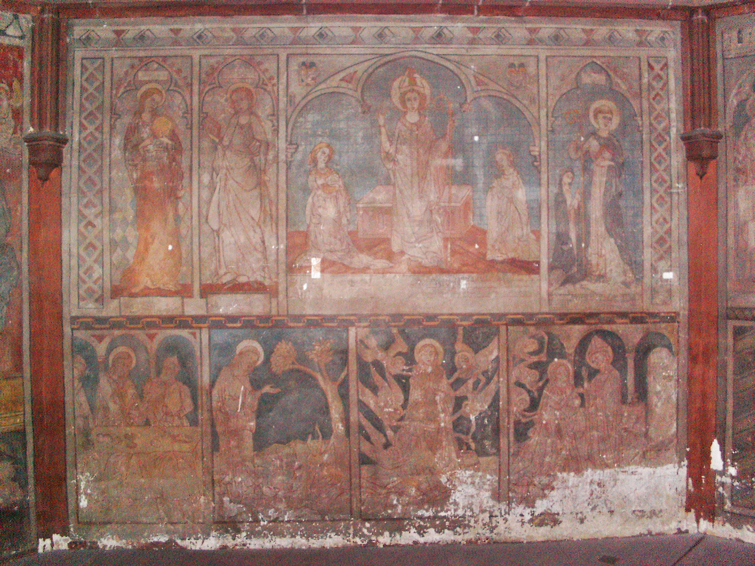 Klosterkirche Lambrecht (Pfalz), mittelalterliche Lambertuswand